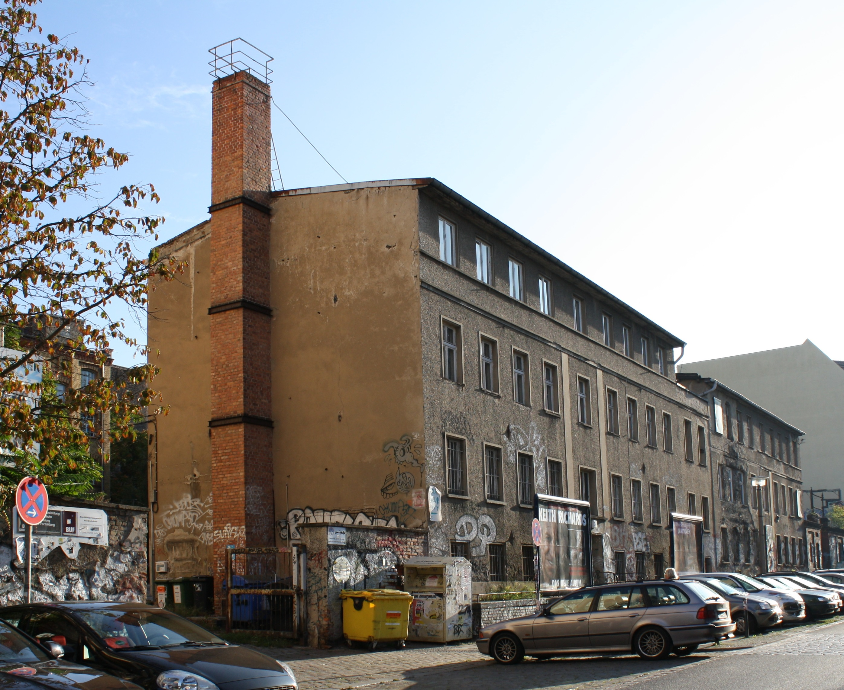 Die Eckertschen Arbeiterwohnhäuser in der Rigaer Straße 72/73. Baujahr 1875/76This is a photograph of an architectural monument.